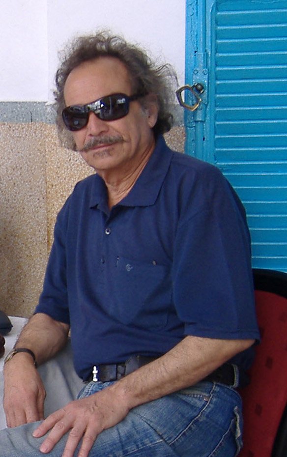 عبد المجيد لكحل خلال حوار في تونس